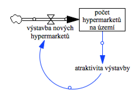 SFD, eskalace v nástroji Vensim